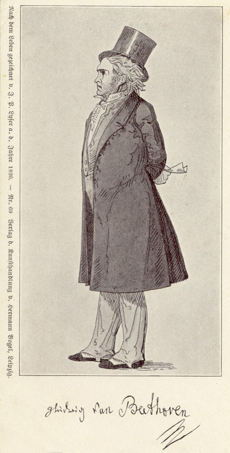 Ludwig van Beethoven. Druck nach einer Zeichnung von Johann Peter Lyser (1803-1870)